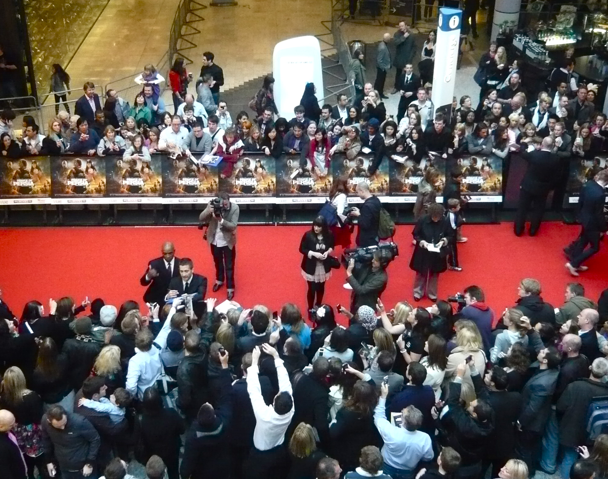 Jake Gyllenhaal